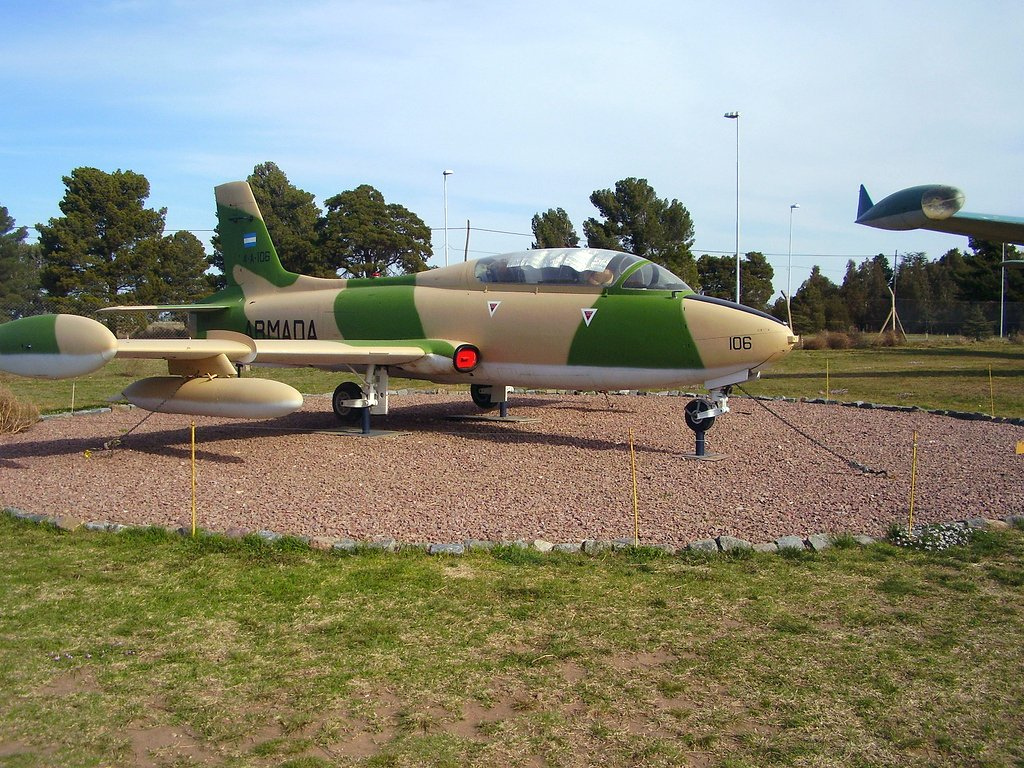 Aermacchi MB-326 PELICAN 4-A-106 - Museo de la Aviacion Naval Argentina, Comandante Espora, Bahia blanca, Argentina